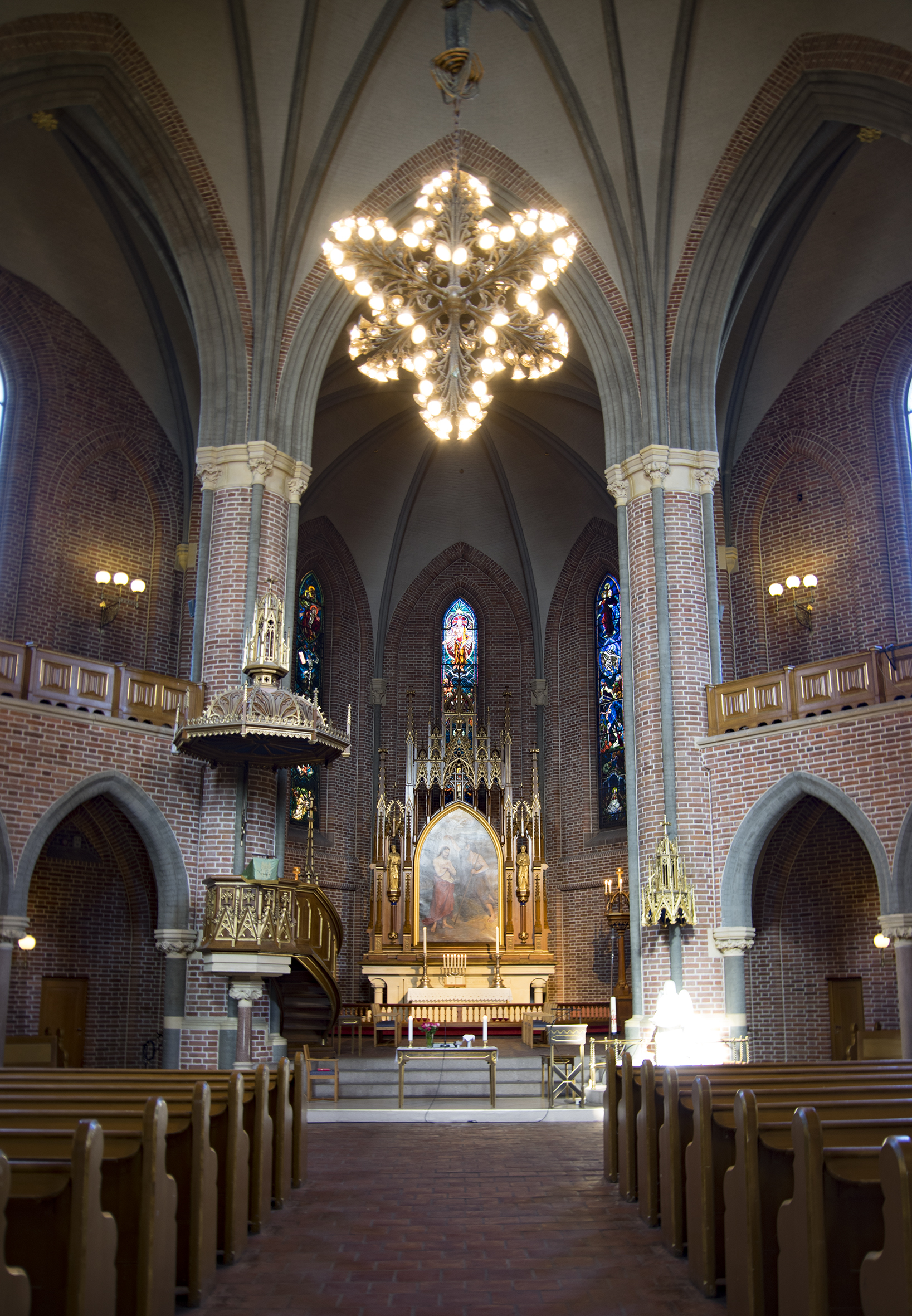 kirkerom,altertavle,prekestol,døpefont